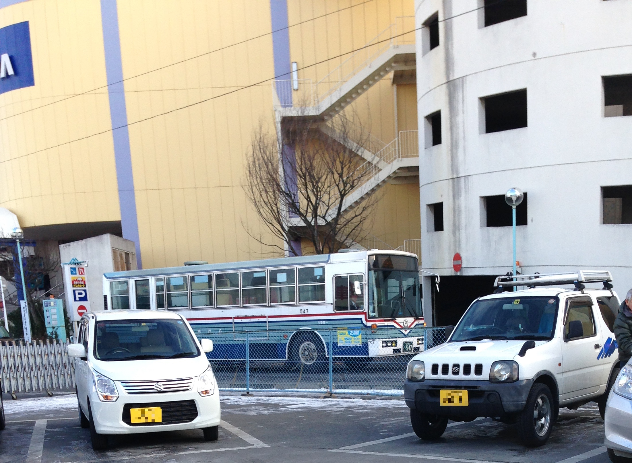 ラピアバスセンターを発車し、ラピア裏手からバス乗り場へ向かう市営バス